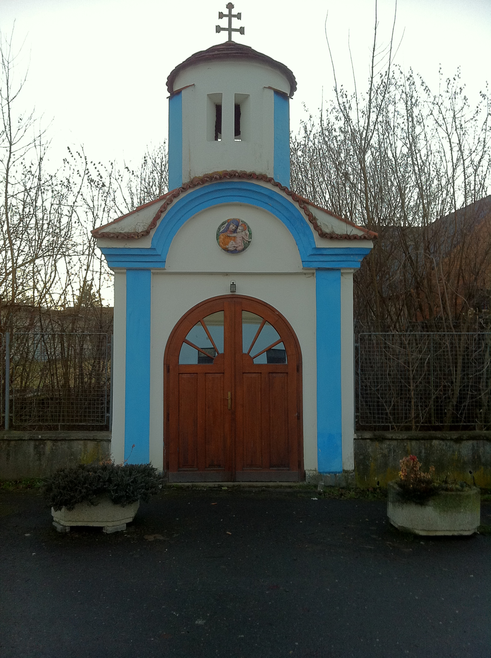 Nespeky, kaplička uprostřed obce.